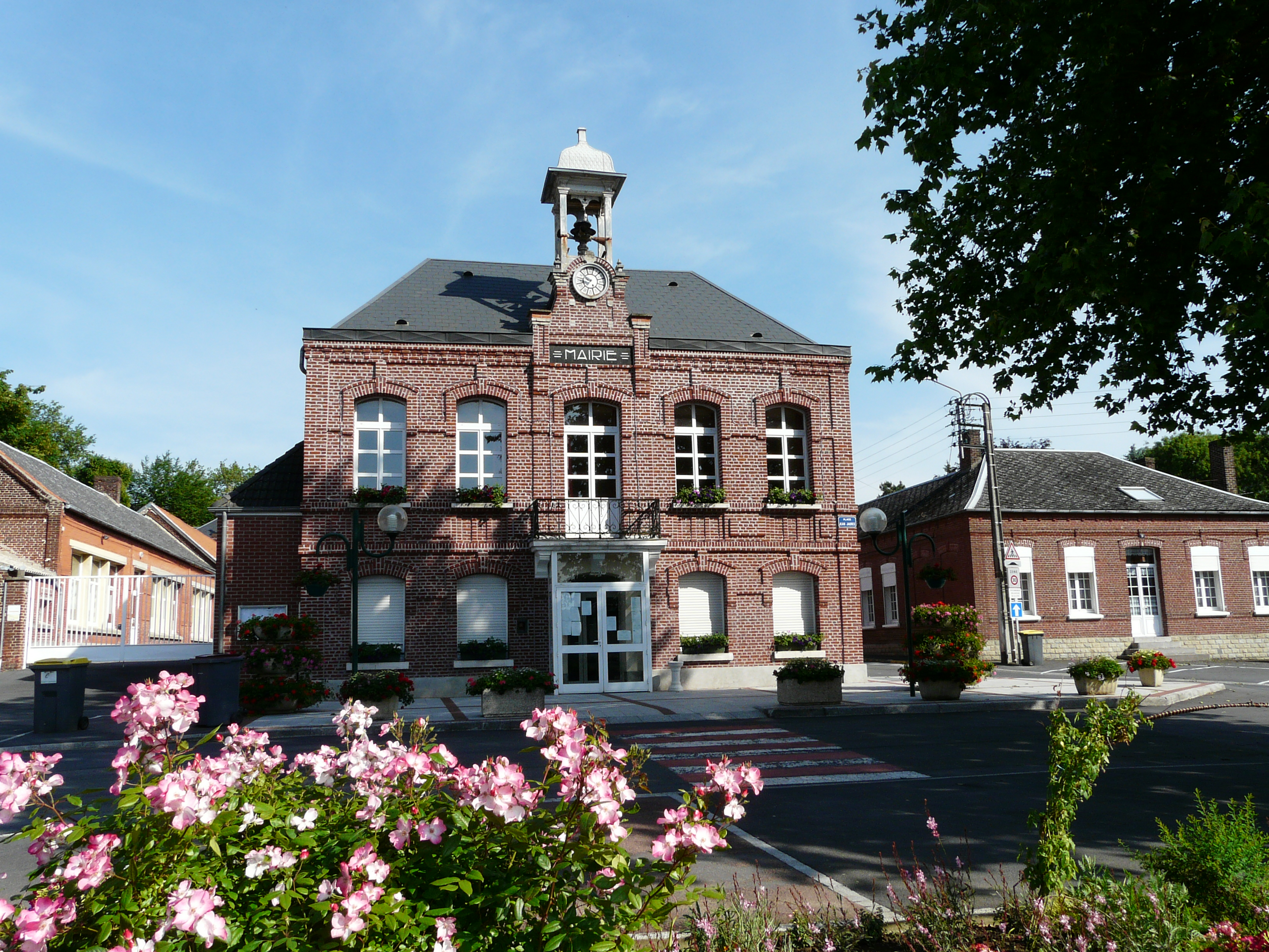 Mairie de Walincourt (Nord, France)